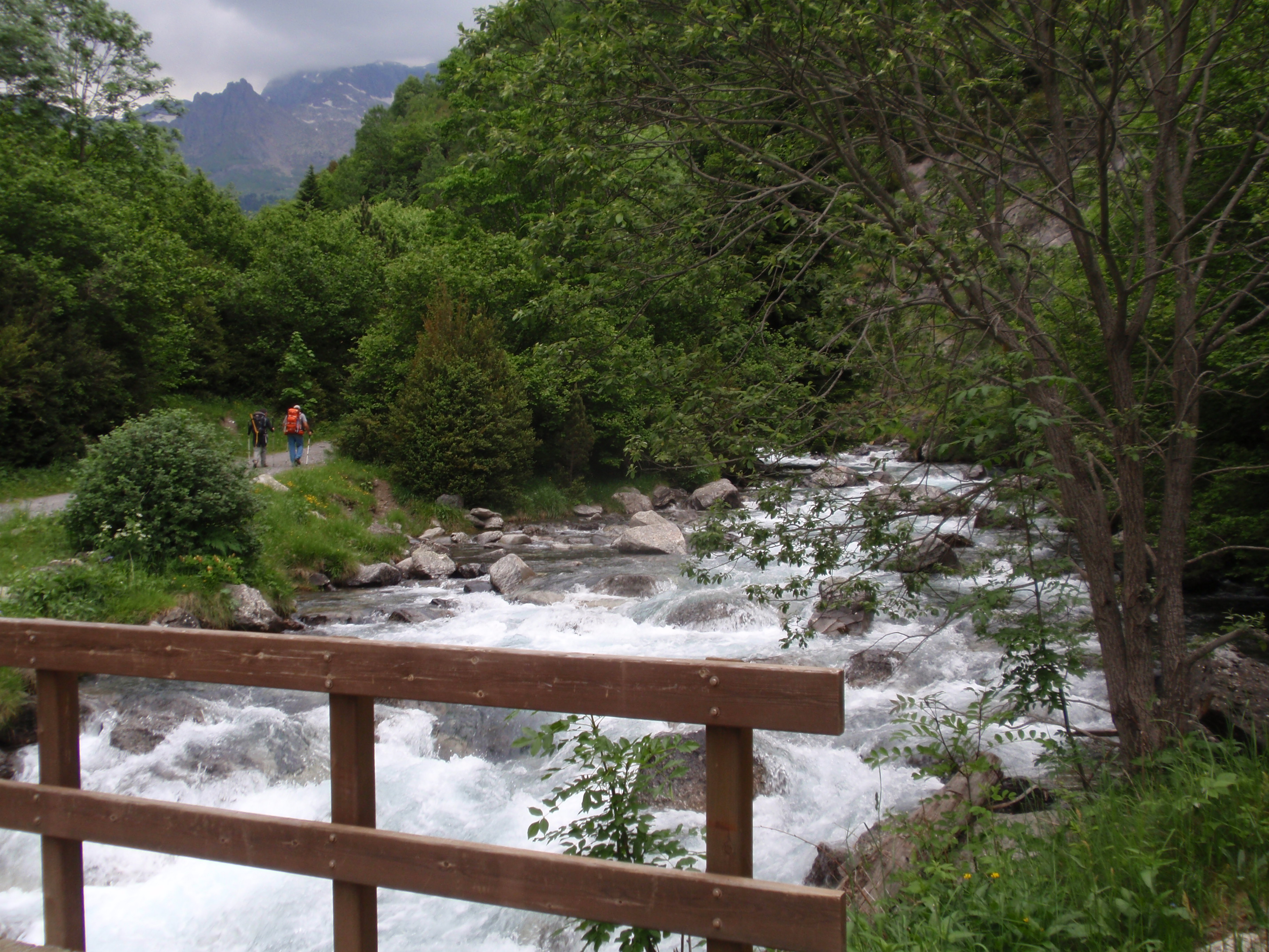 Río Estós (Huesca, España) a su paso por la palanca (puente) de Aiguacari.